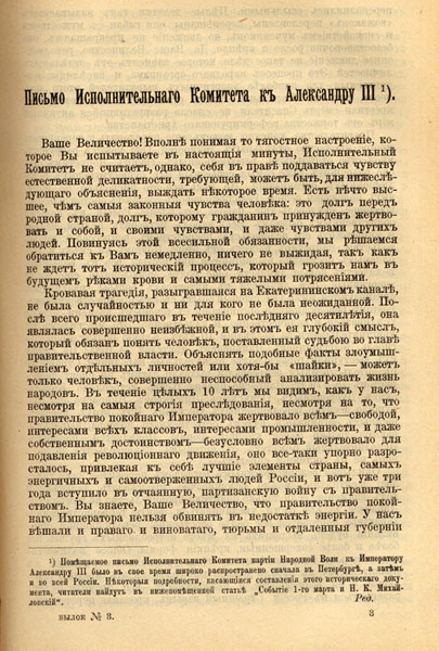 Lettera di Narodnaja Volja ad Alessandro III di Russia